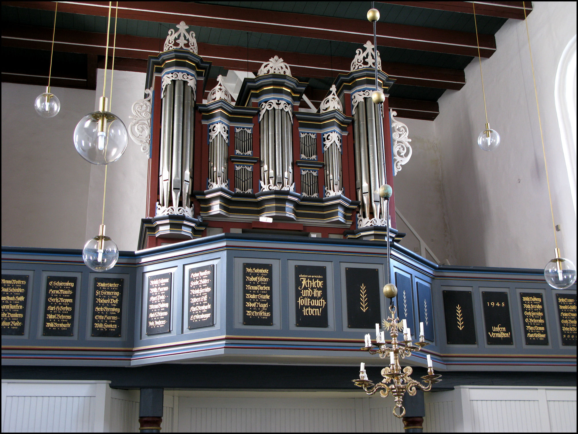 Orgel der Kirche Zum Heiligen Kreuz und St. Peter in Jever-Cleverns